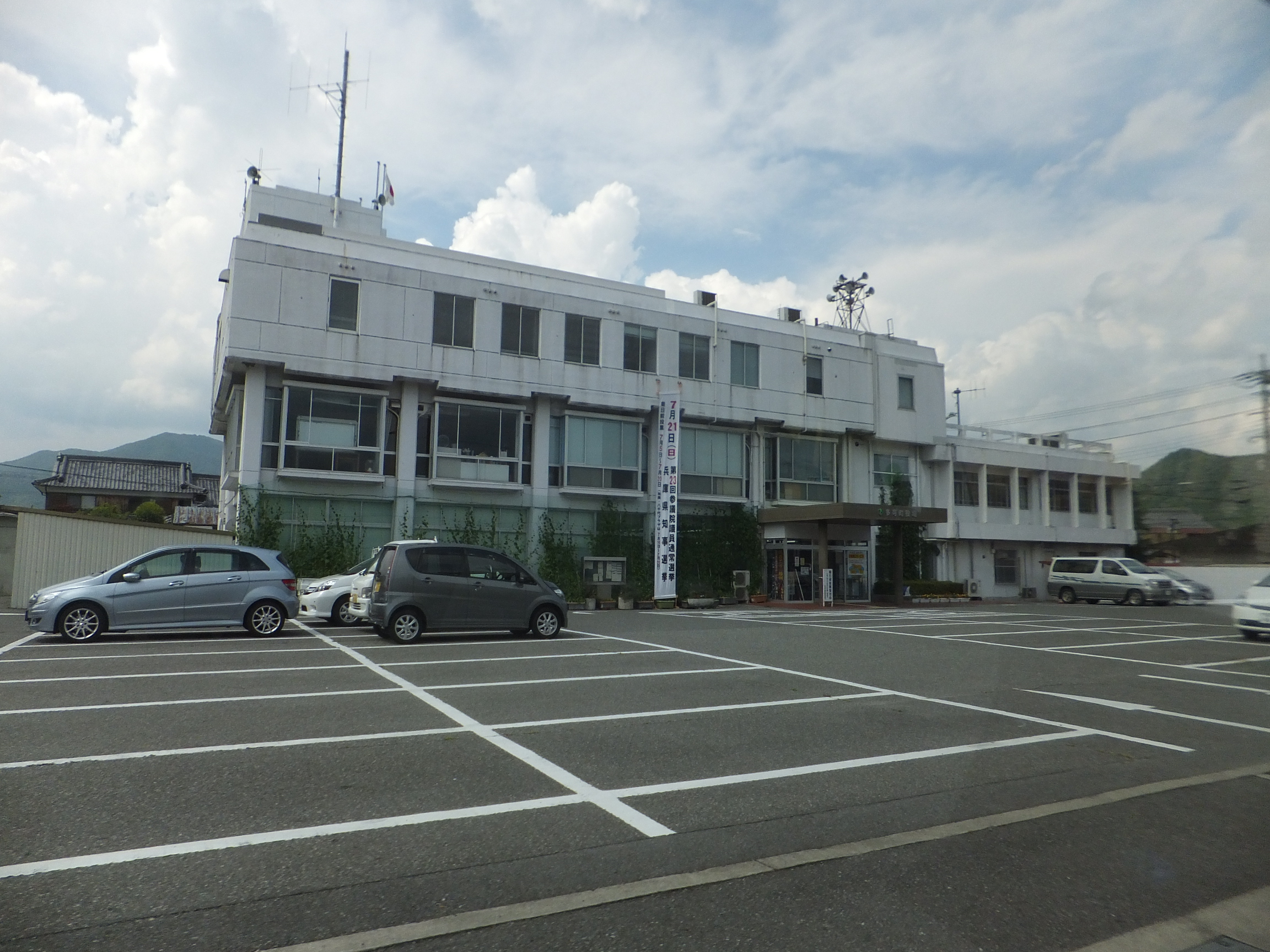 多可町役場